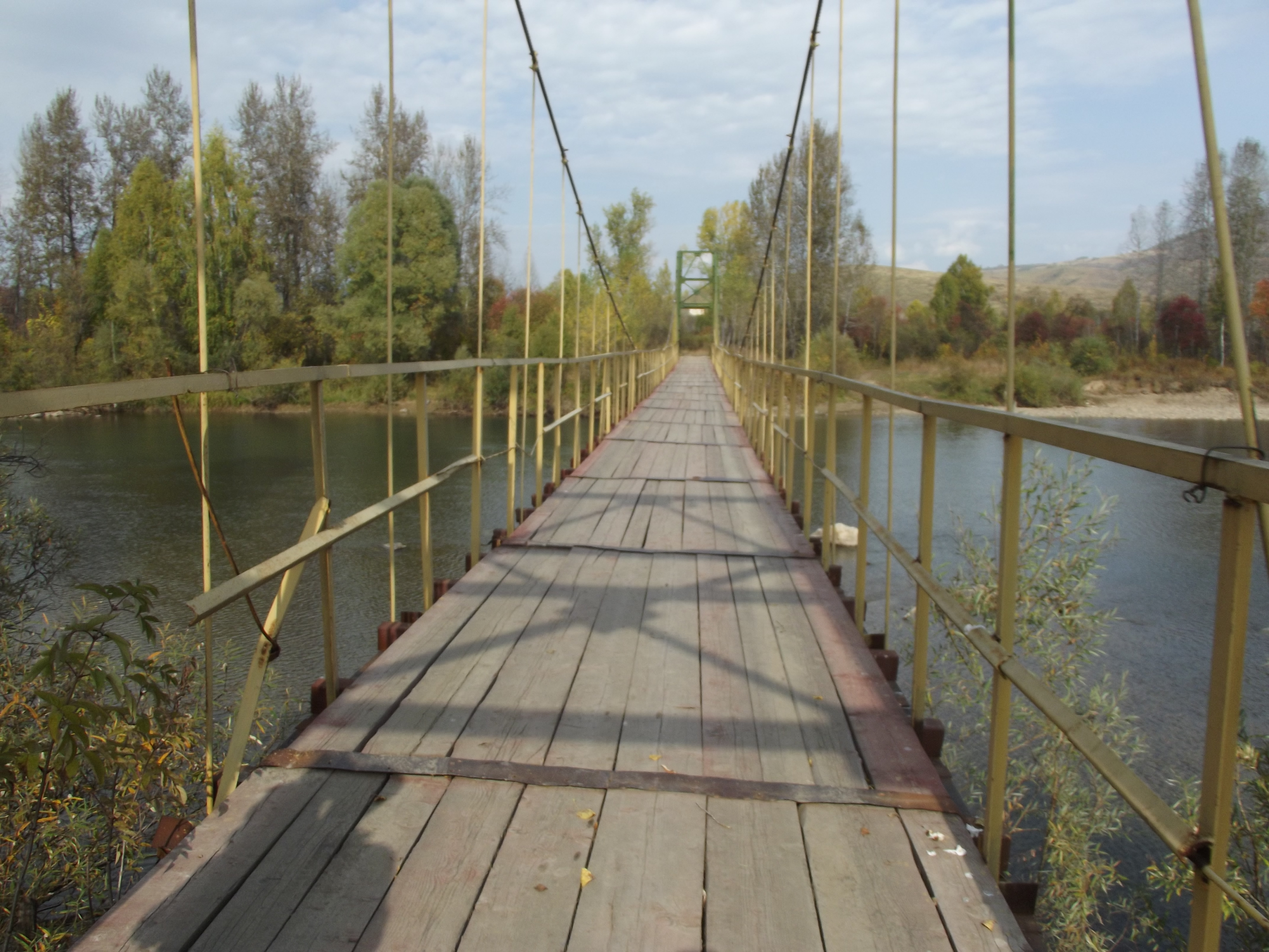 мост